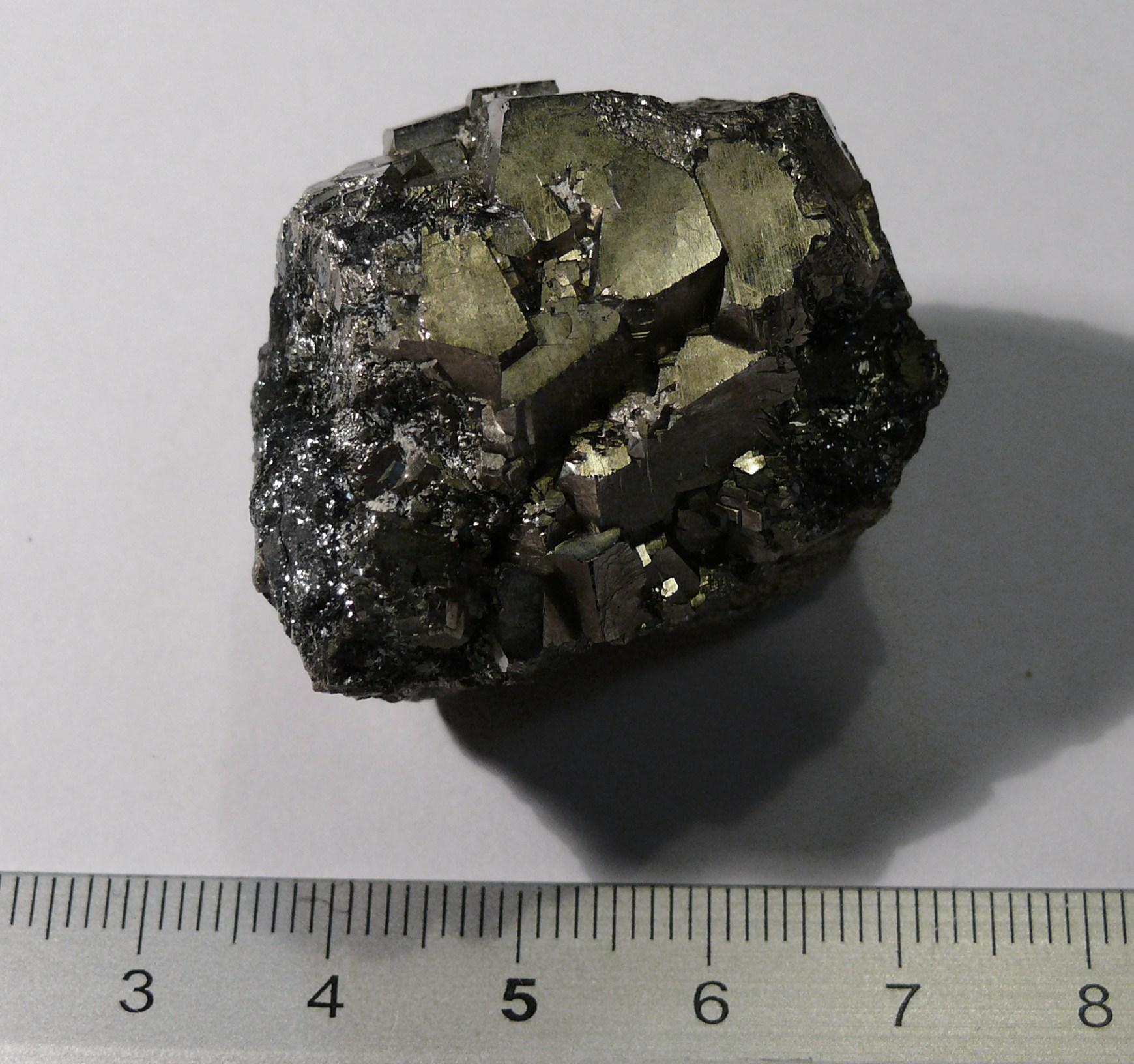 pirite dell'Isola d'Elba